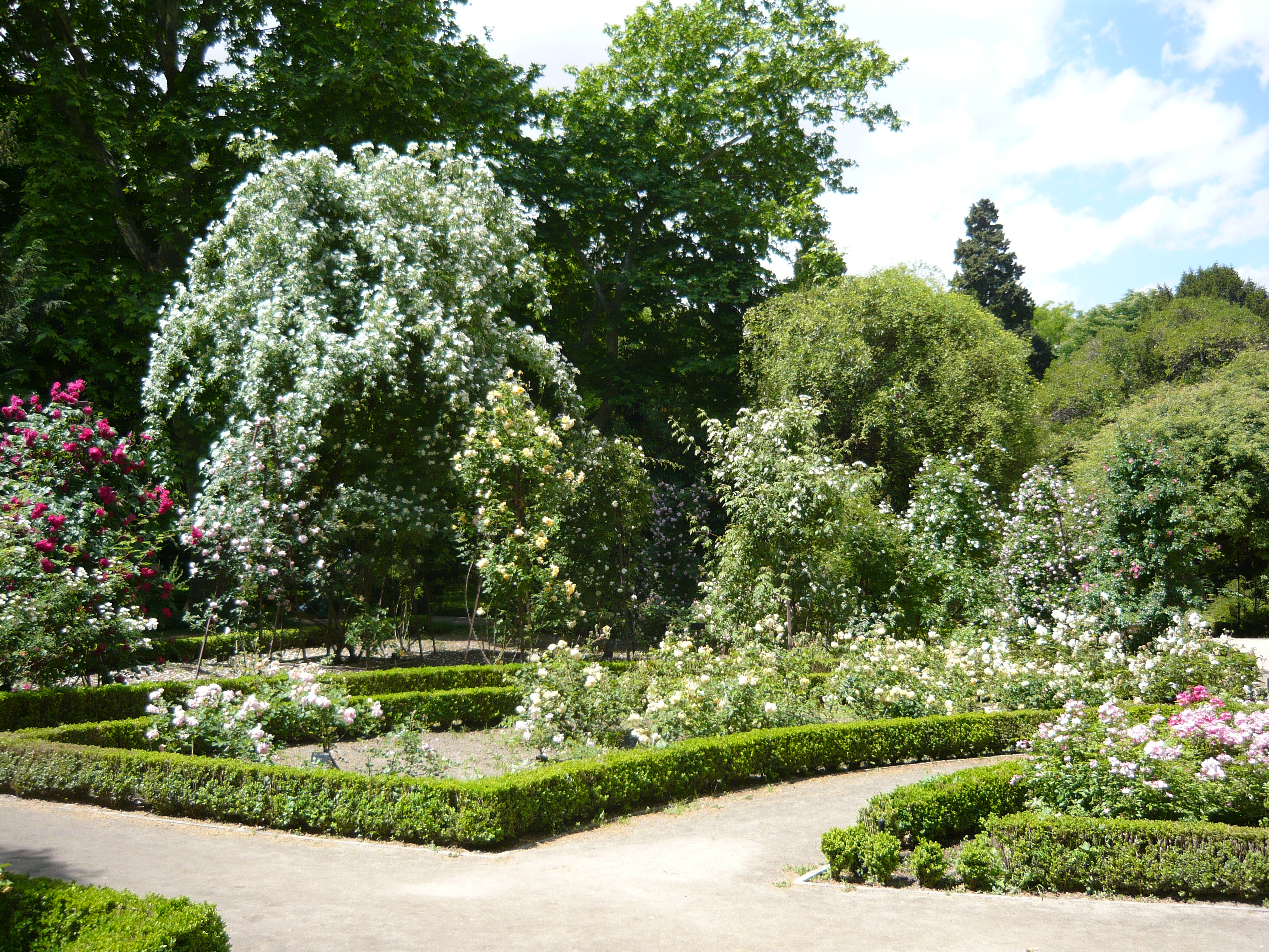 Vista de la colección de rosas antiguas. Real Jardín Botánico de Madrid.